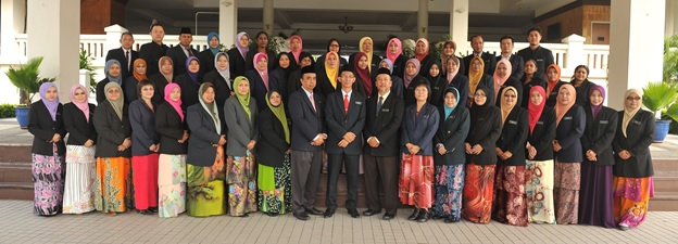 Para Pendidik SMK Tok Perdana pada tahun 2016